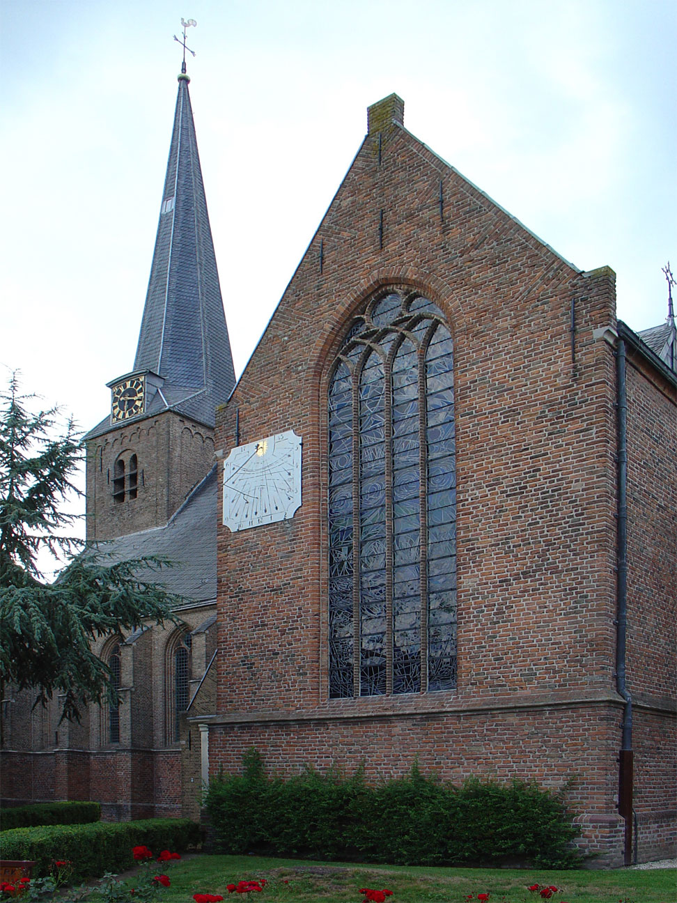 De hervormde kerk van Benschop (Nicolaaskerk)